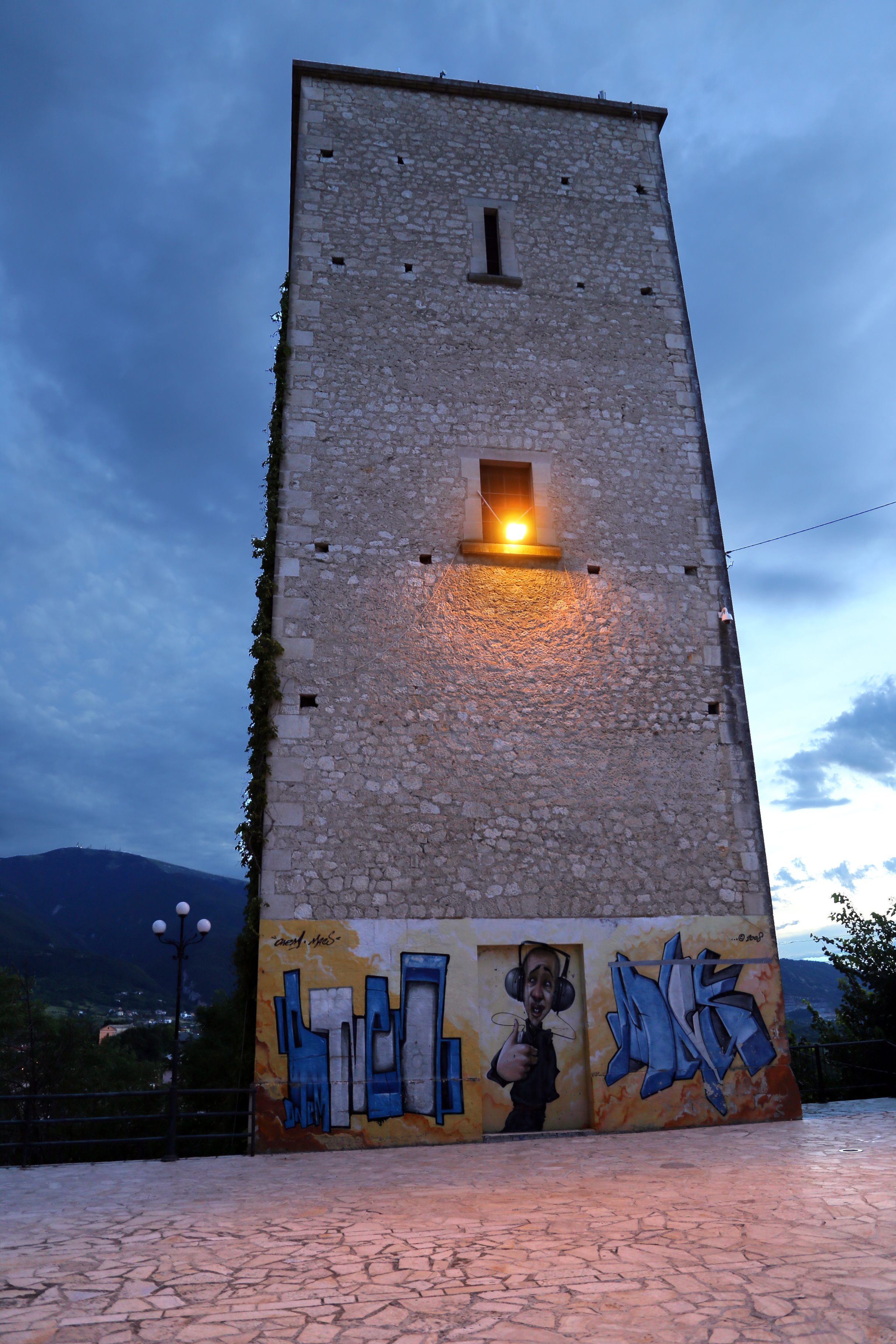 Torrione Orsini This is a photo of a monument which is part of cultural heritage of Italy.